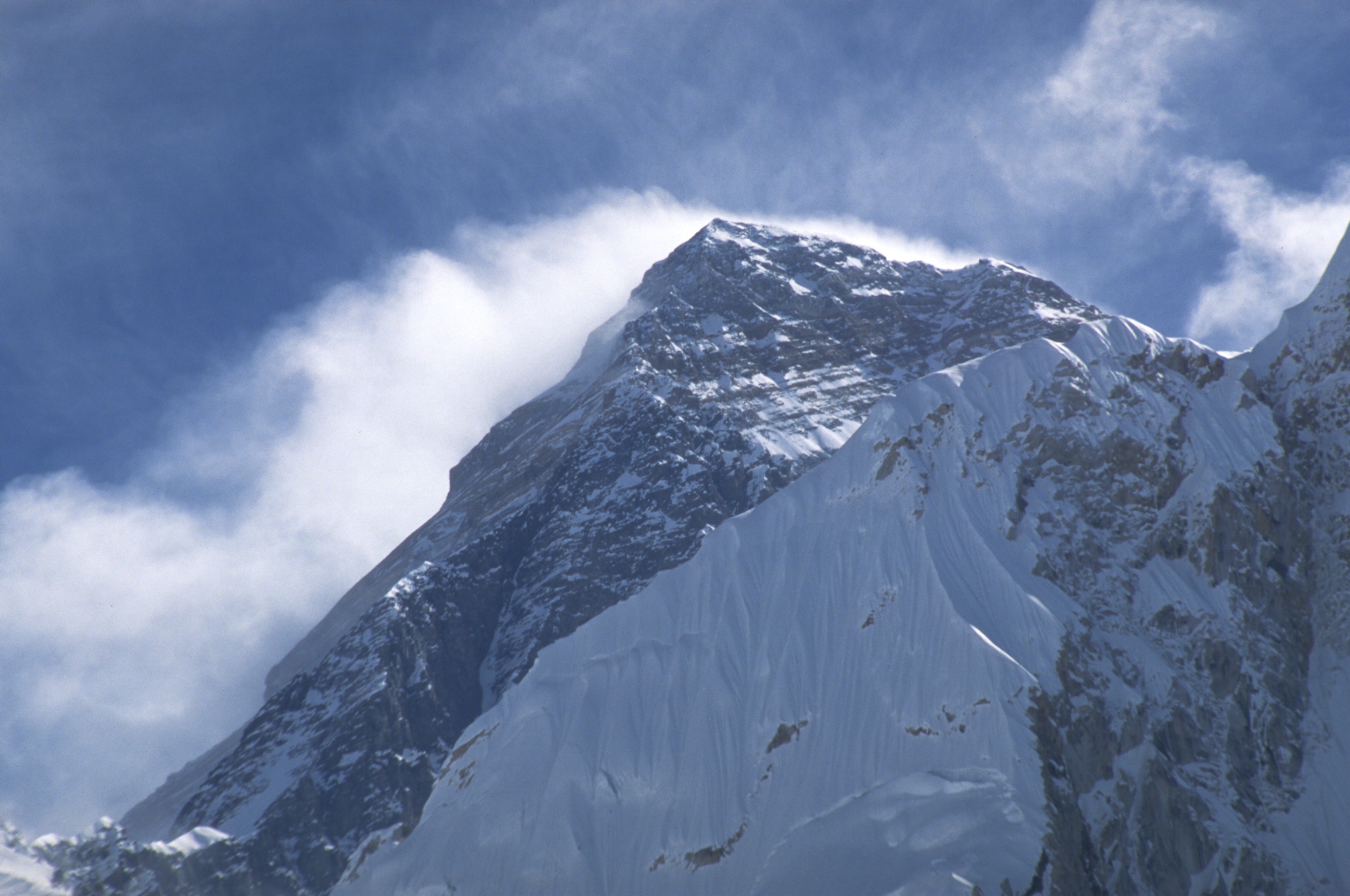 Everest, Nepal